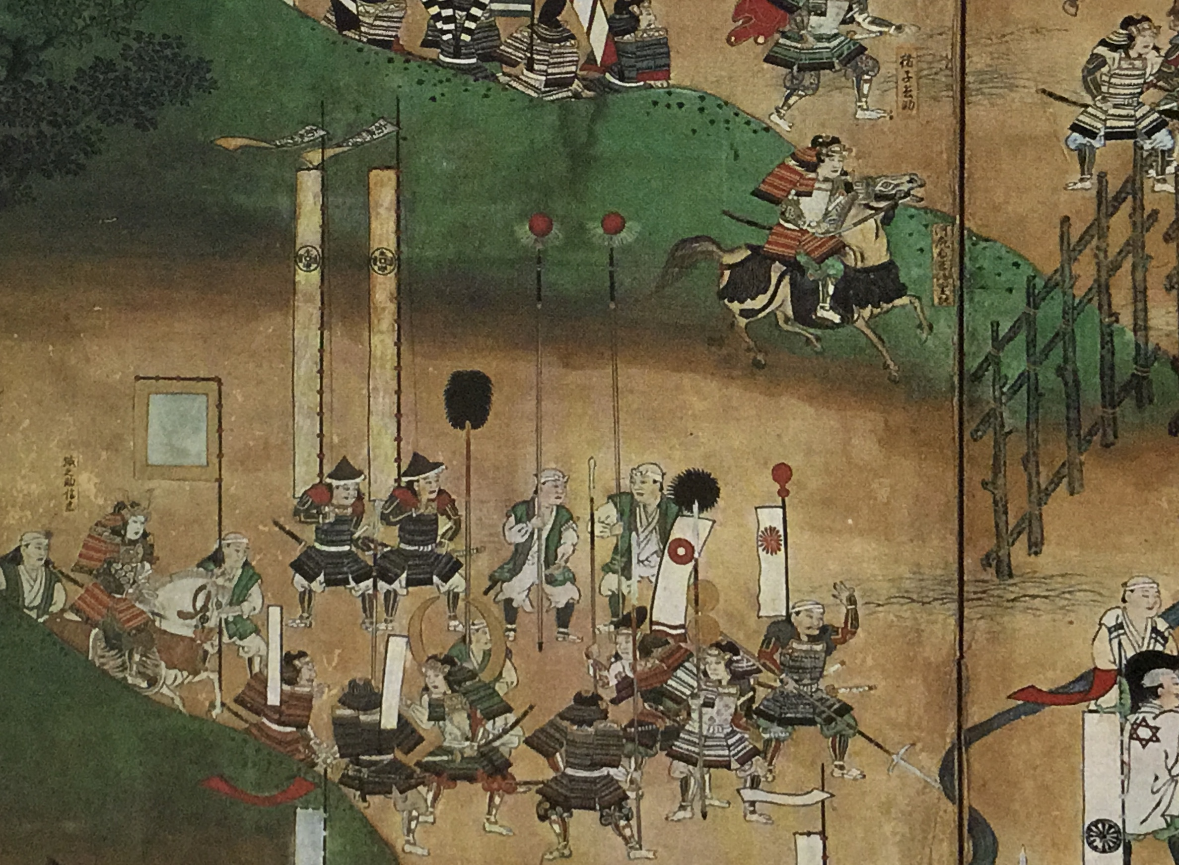 『長篠合戦図屏風』(成瀬家本)より織田信忠と河尻秀隆